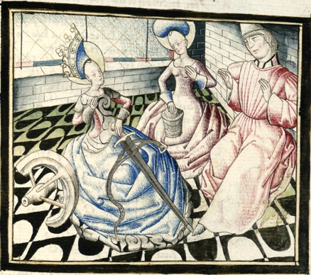 ChampionDesDames-Grenoble-Ms0352